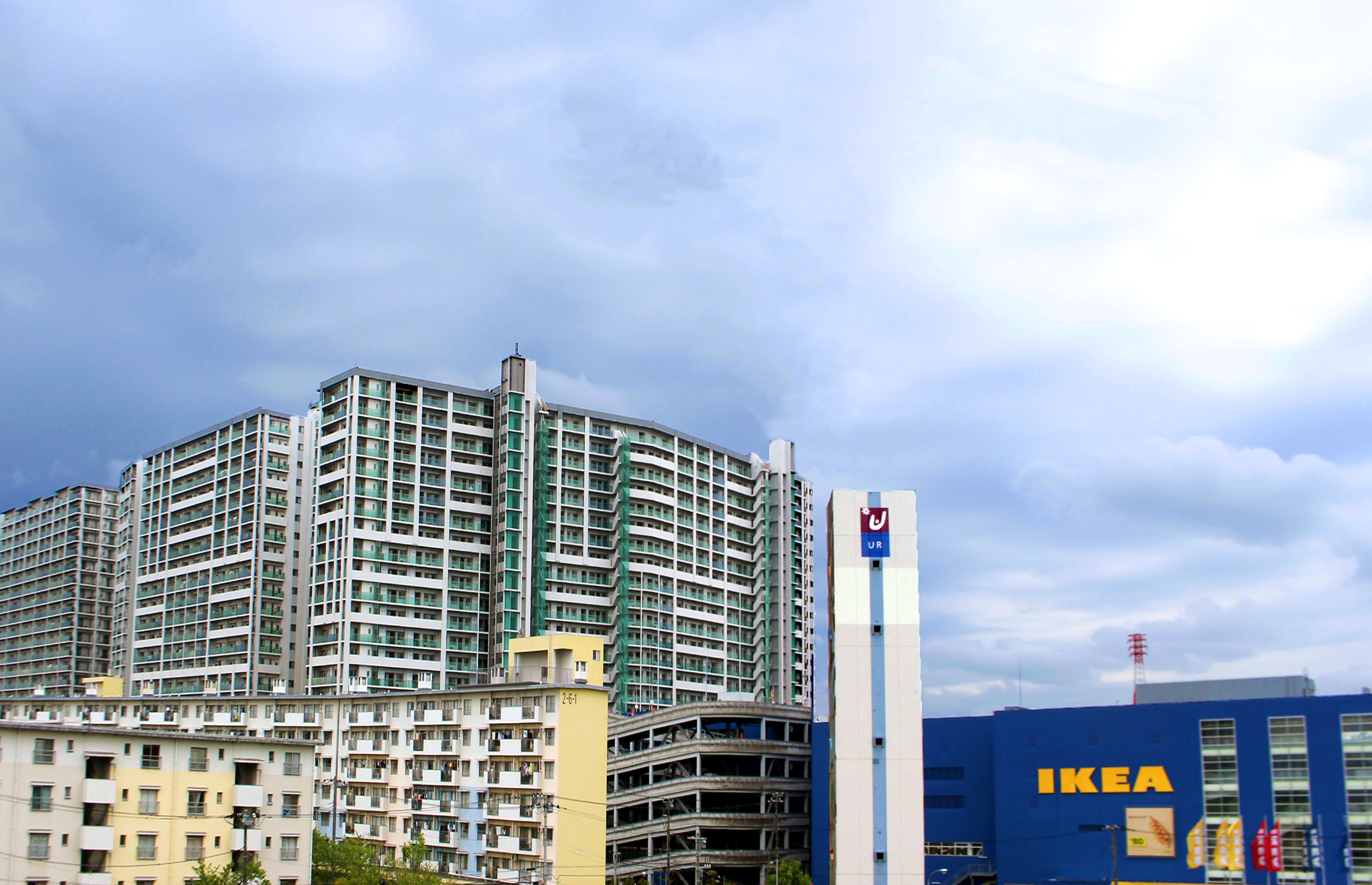 南船橋駅南口の若松団地・IKEA・ワンダーベイシティサザン（高層マンション）